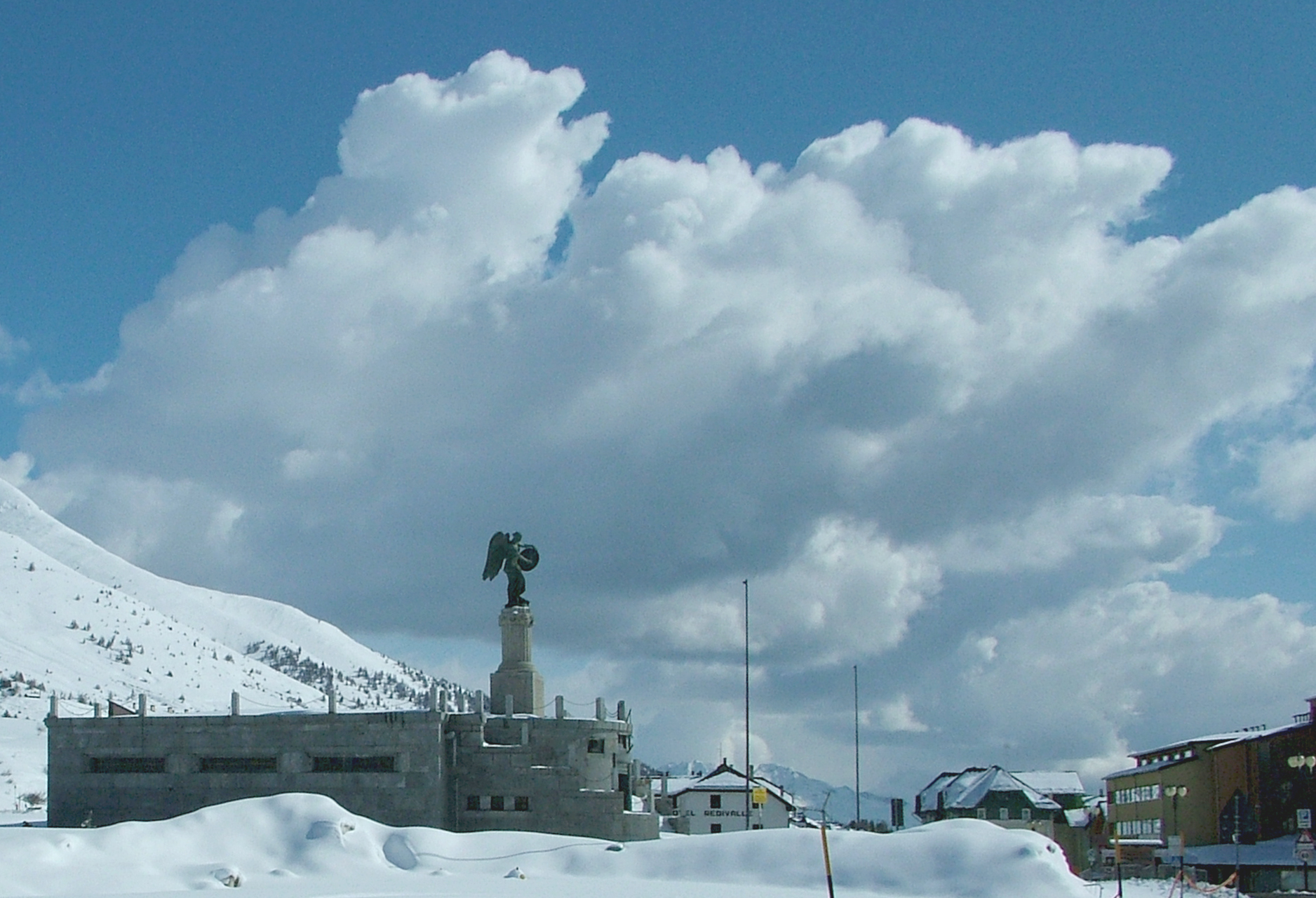 I. világháborús emlékmű, Tonale, Olaszország